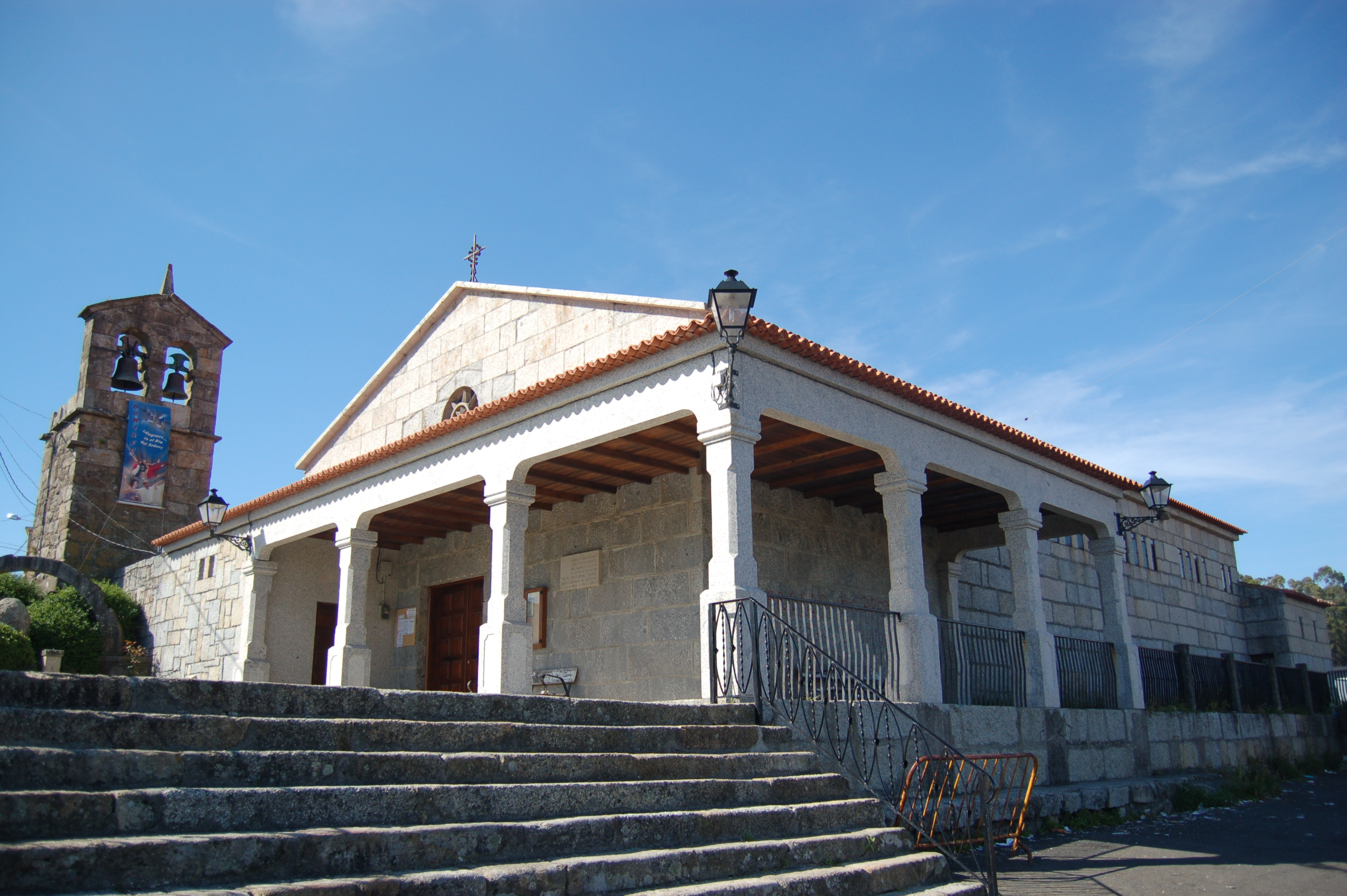 Igrexa parroquial de Santo Adrián de Vilariño (Cambados)